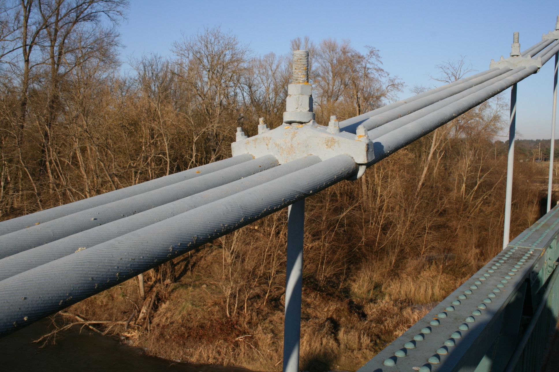 Pont de Châtillon-sur-Loire (Loiret - France) - Pont suspendu franchissant la Loire - Câbles porteurs et suspentes.